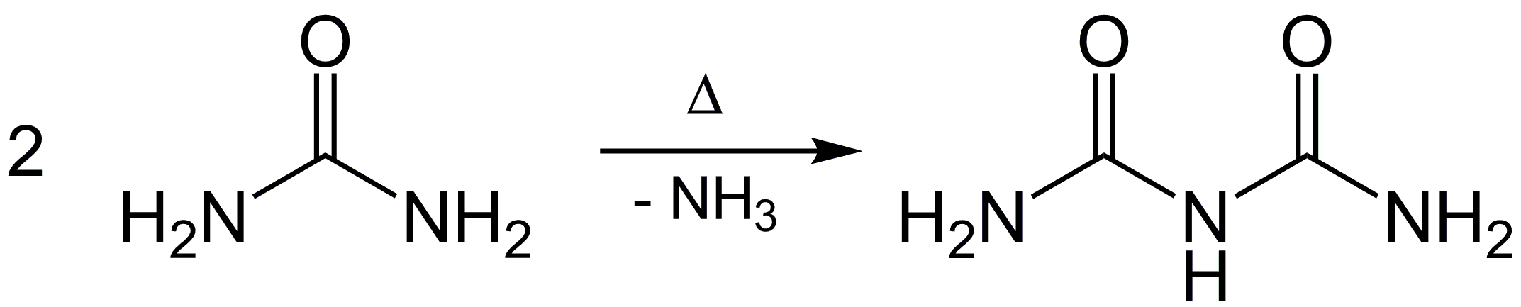 Biruetsynthese ausgehend von zwei Harnstoffmolekülen